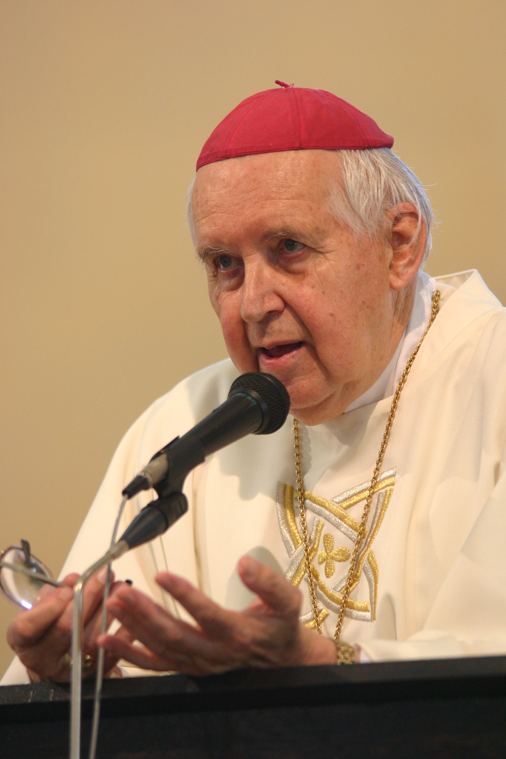 Josef Koukl 6. září 2007 v katedrále sv. Štěpána v Litoměřicích.